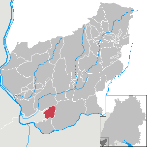 Inzlingen, Landkreis Lörrach, Baden-Württemberg